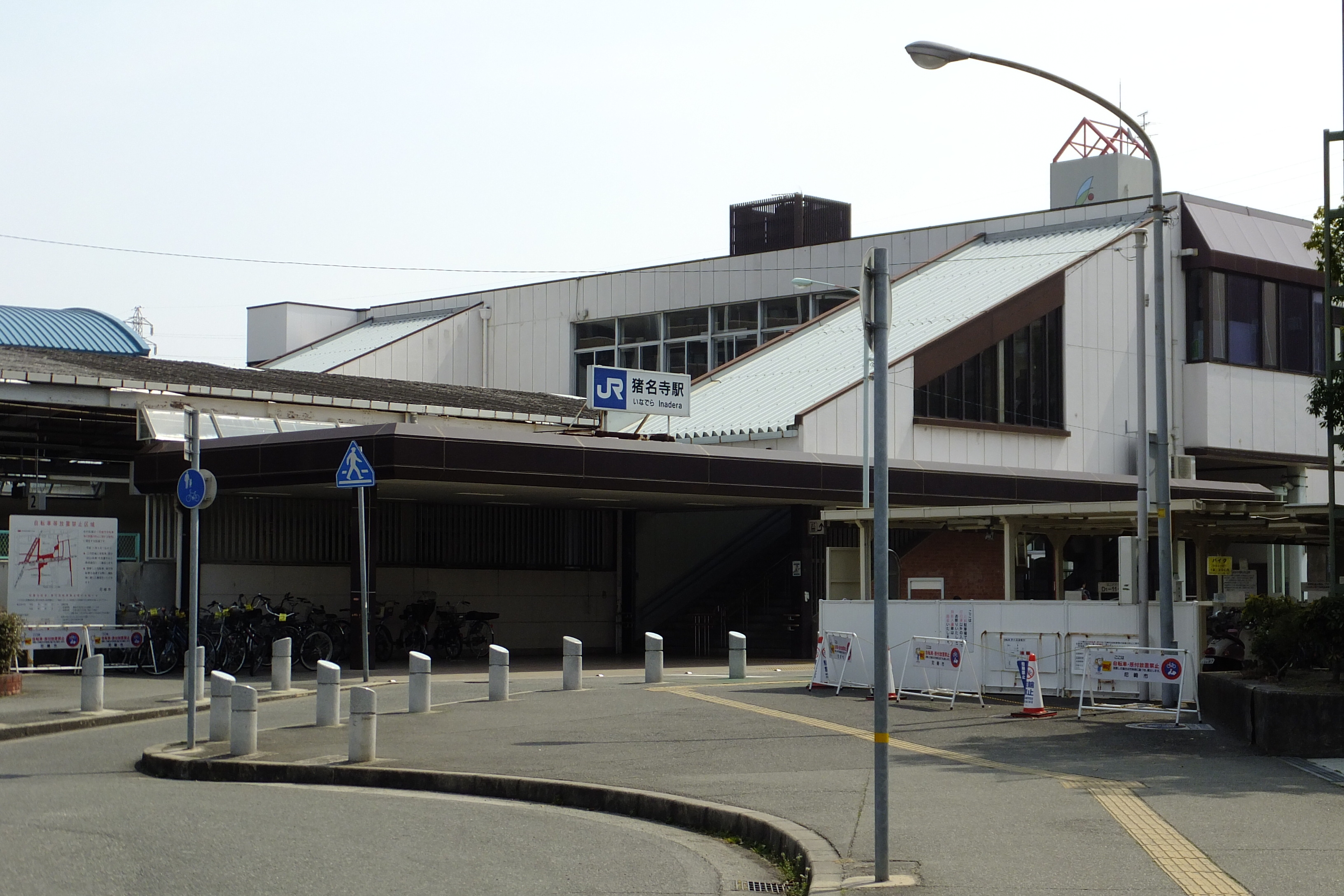 JR西日本 福知山線 猪名寺駅西口